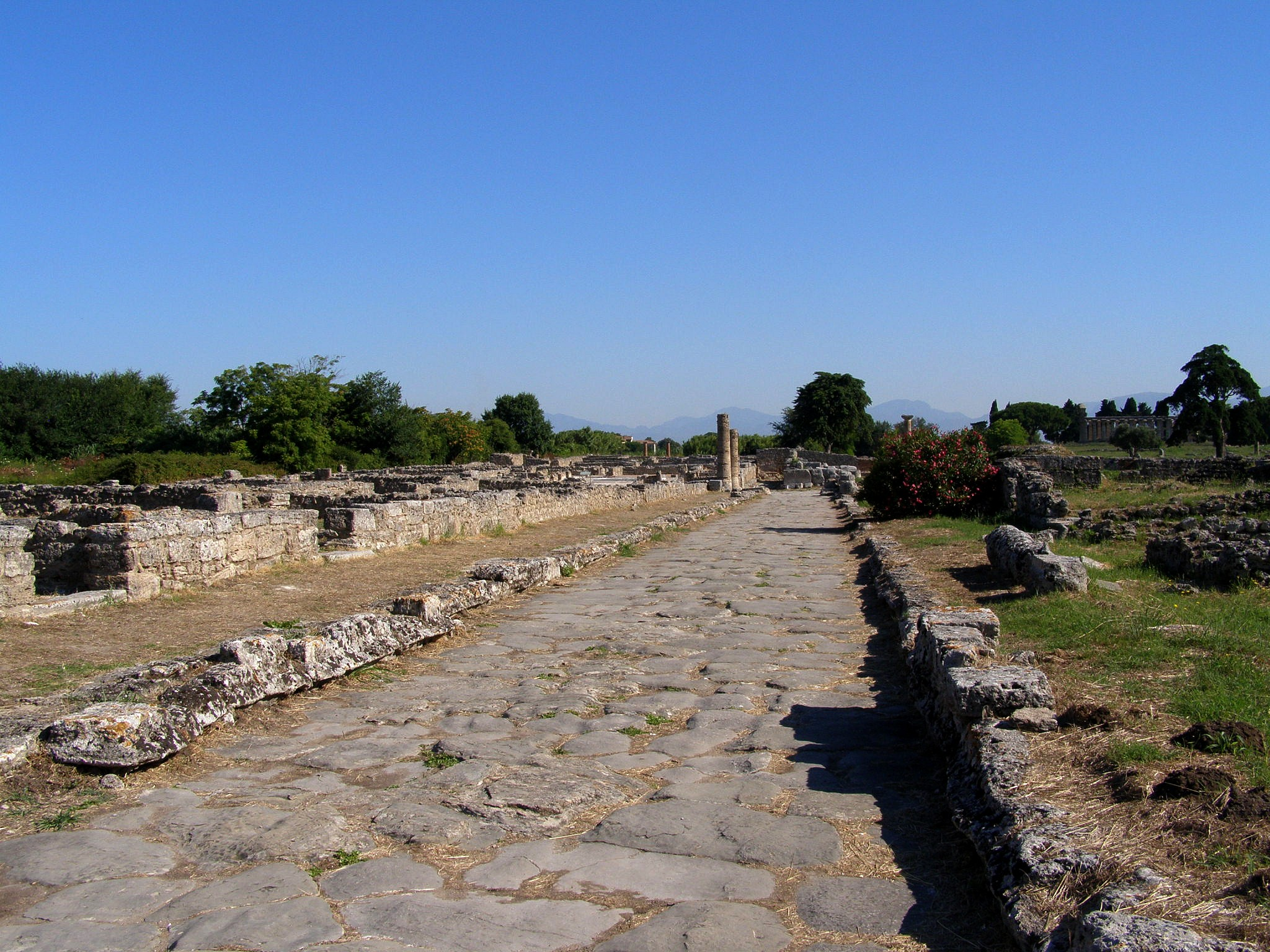 Ulica v Paeste